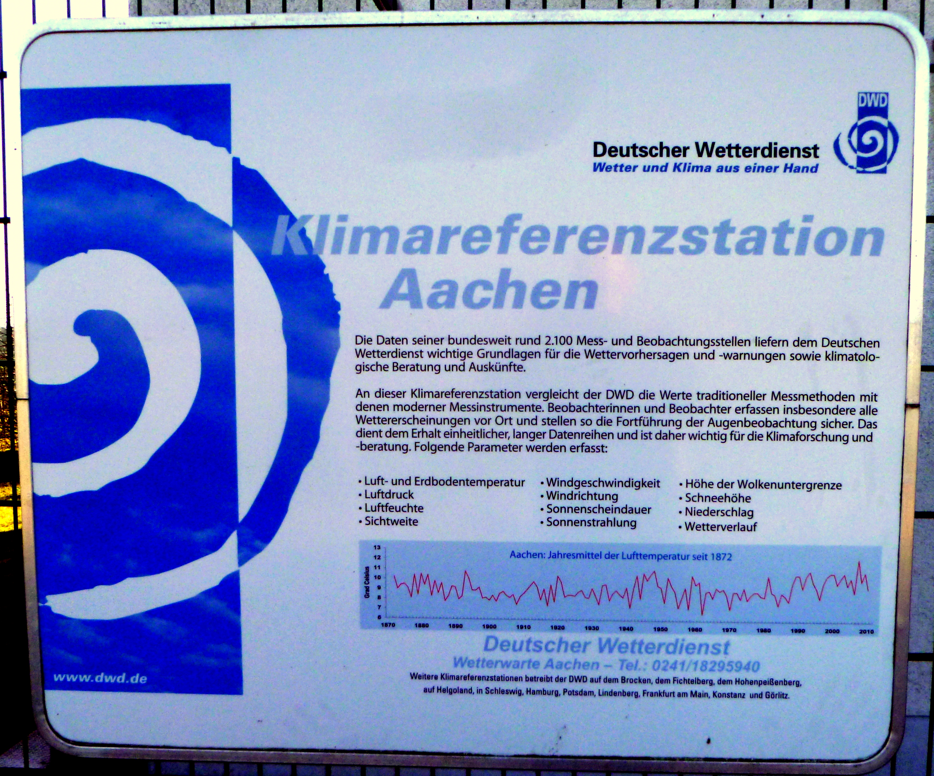 Hinweistafel an der Wetterarte Aachen-ORsbach